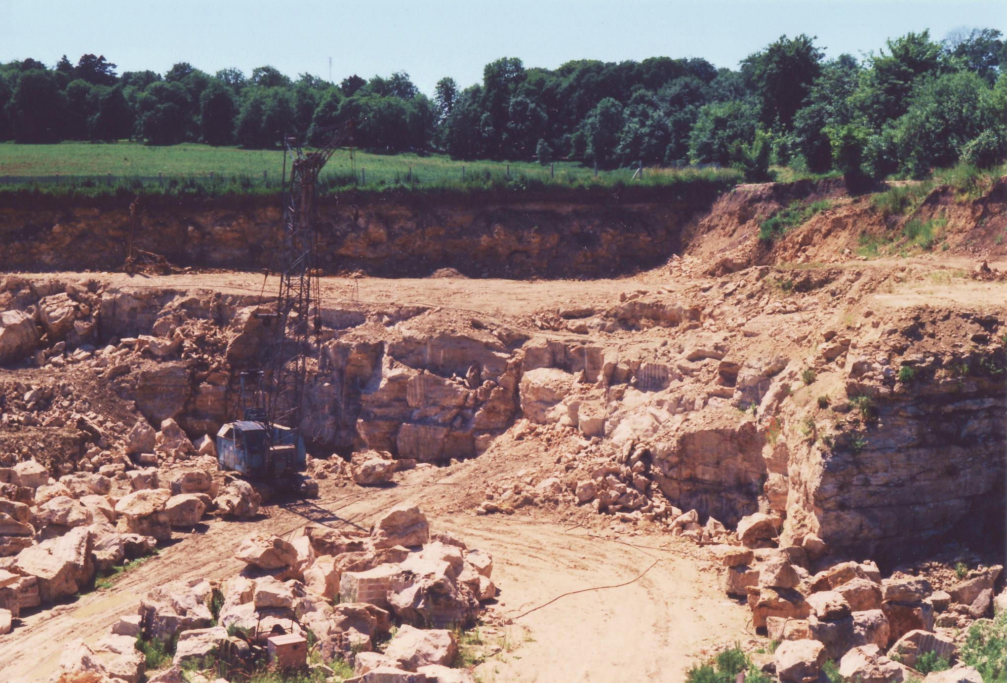 Travertin-Steinbruch in Weimar-Ehringsdorf.